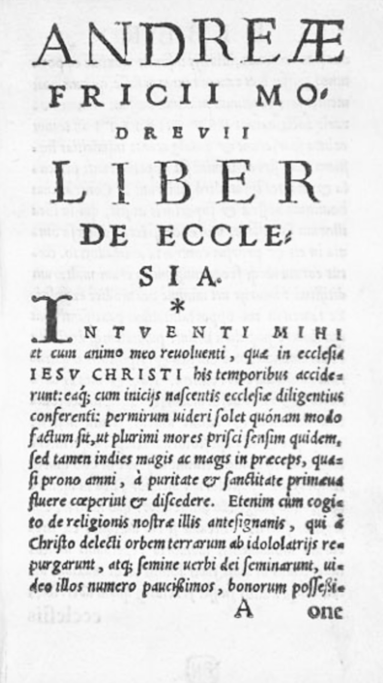 Andreae Fricii Liber De ecclesia - O kościele Andrzeja Frycza Modrzewskiego.